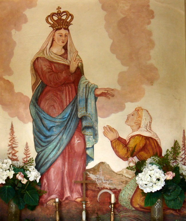 Santa Maria di Feletto: affresco